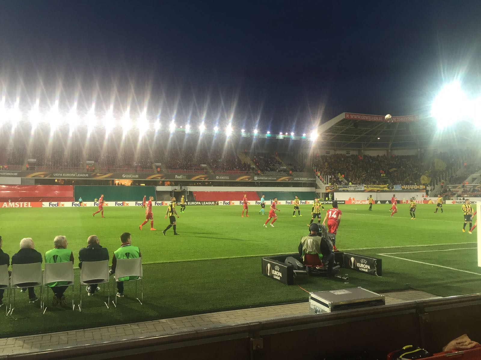 Zulte Waregem vs SBV Vitesse on 19 October 2017 at Regenboogstadion, Waregem